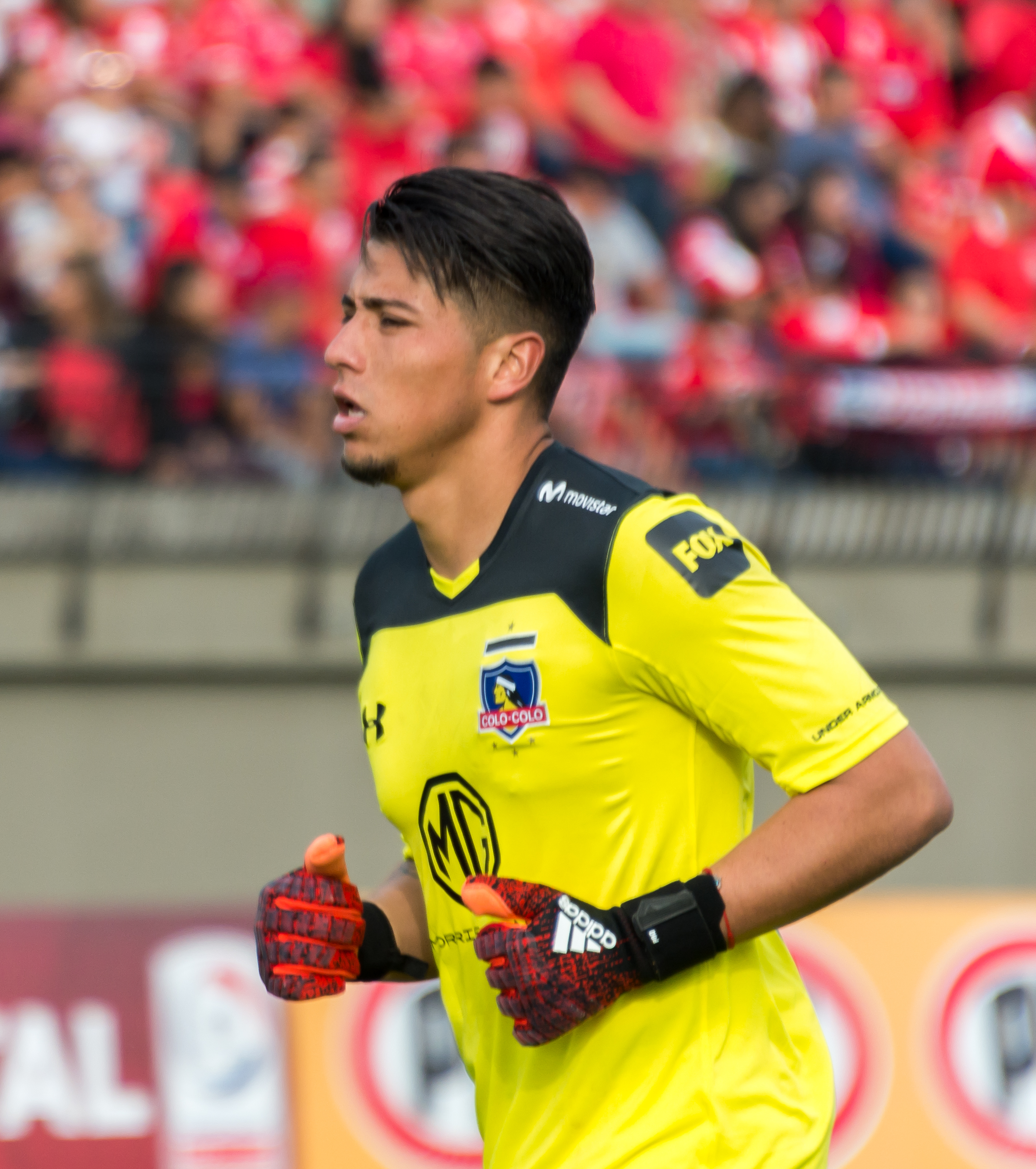 Brayan Cortés, Unión La Calera v Colo-Colo, Estadio Municipal Nicolás Chahúan Nazar, La Calera, Región de Valparaíso, Chile.